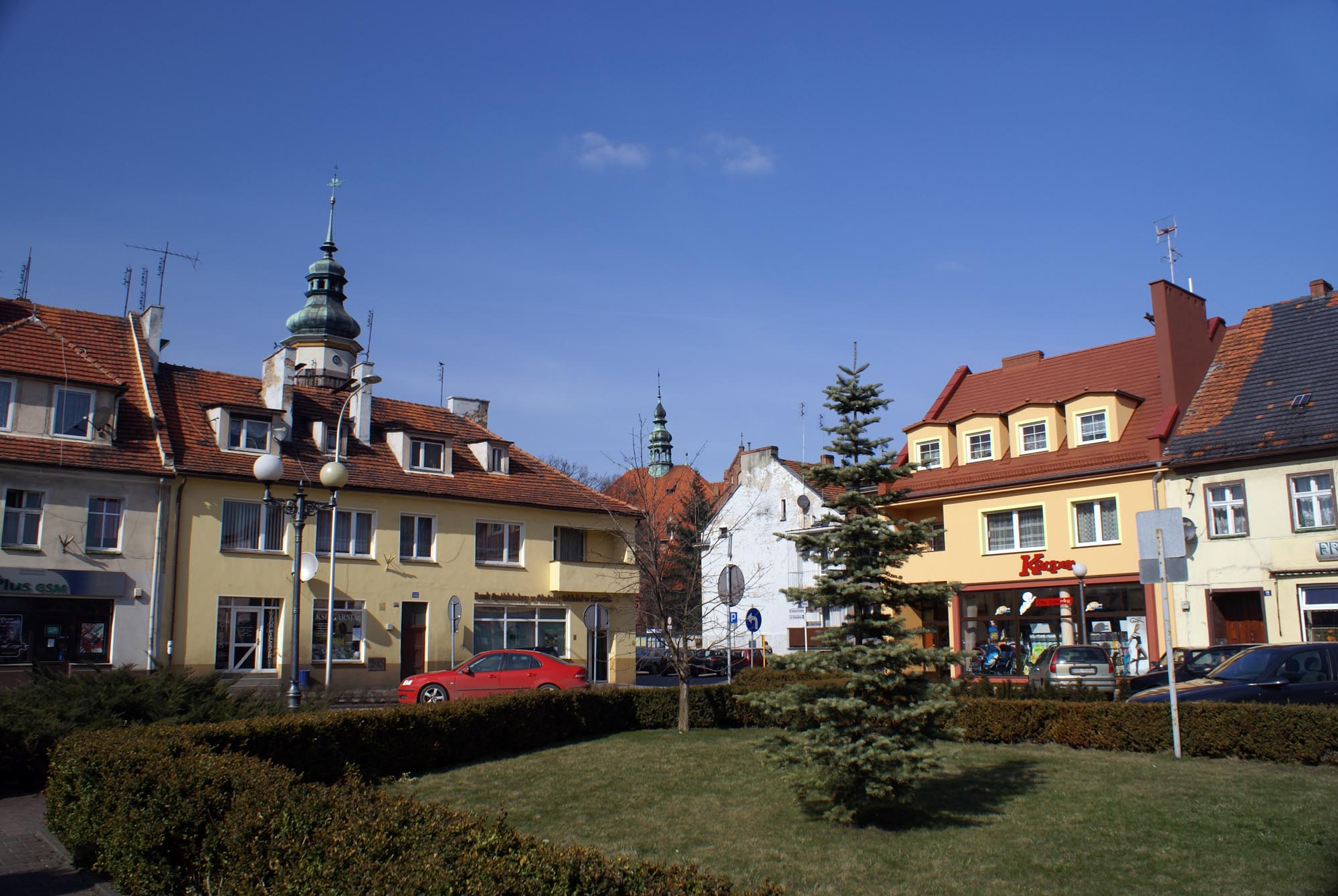 Syców, ośrodek historyczny miasta